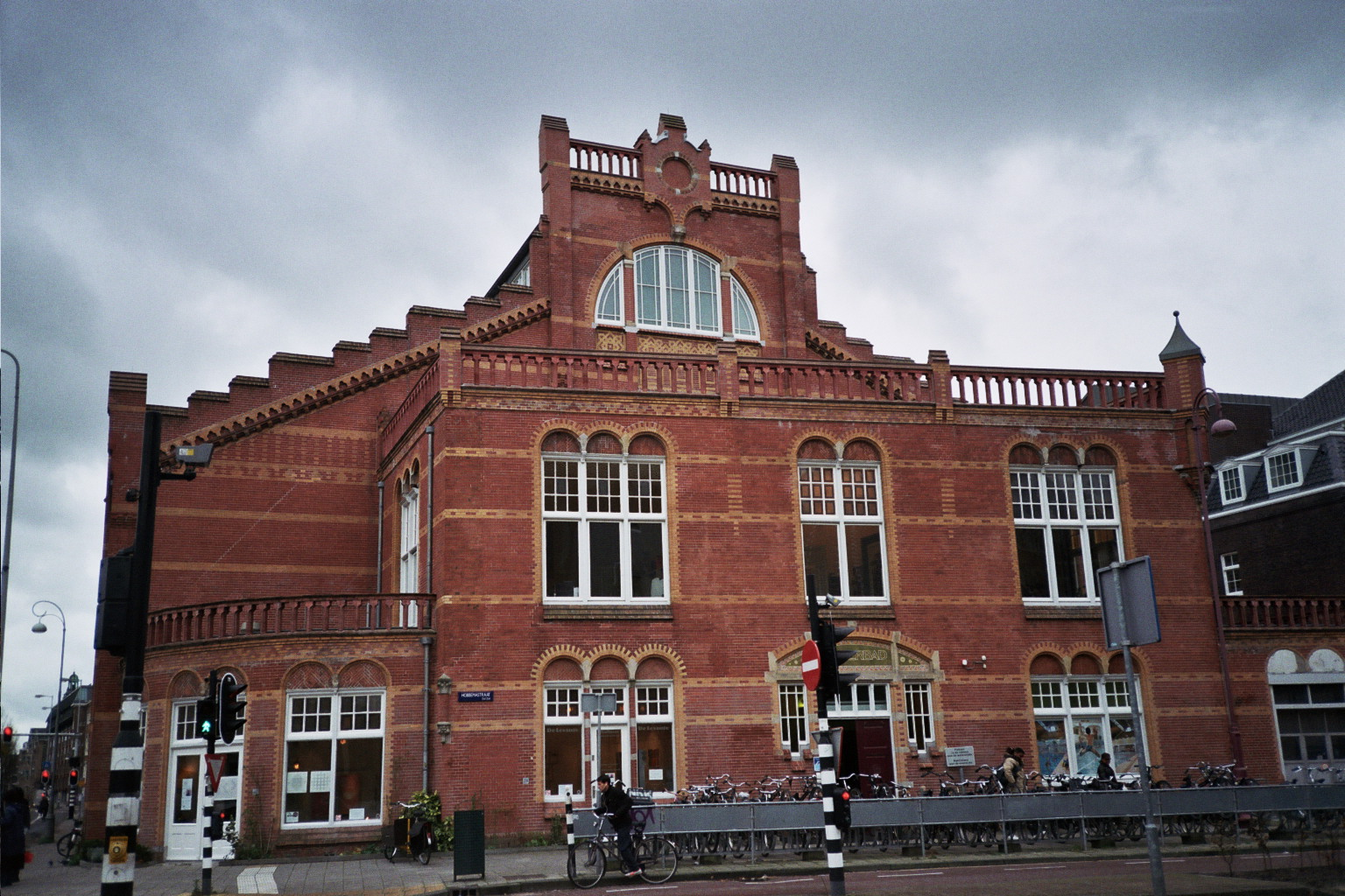 Het Zuiderbad, Amsterdam stond op het punt gesloten te worden in de jaren 70. De gemeente had hiertoe al het besluit genomen. Dankzij de inzet van 250 vrijwilligers, de vrienden van het zuiderbad en de bereidheid van de toenmalige directeur om het zwembad voor een euro te verkopen is het zwembad behouden gebleven. De vrijwilligers hebben het bad drie maanden lang gerund en onderhouden, waarna de gemeente tot inzicht kwam hoe geliefd het bad eigenlijk was. De gemeente heeft toen haar eerder genomen besluit ingetrokken.